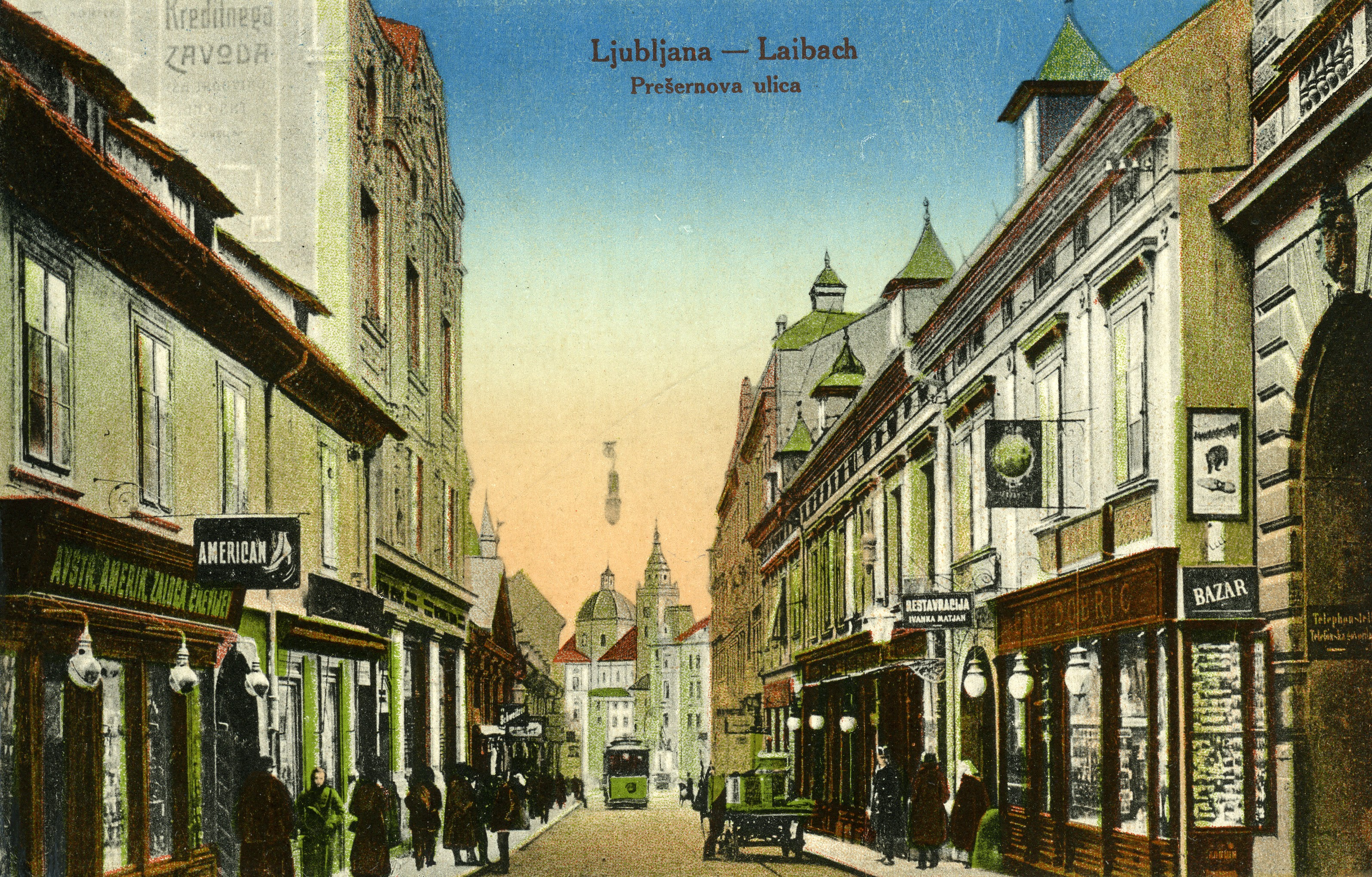 Razglednica Prešernove (Čopove) ulice.